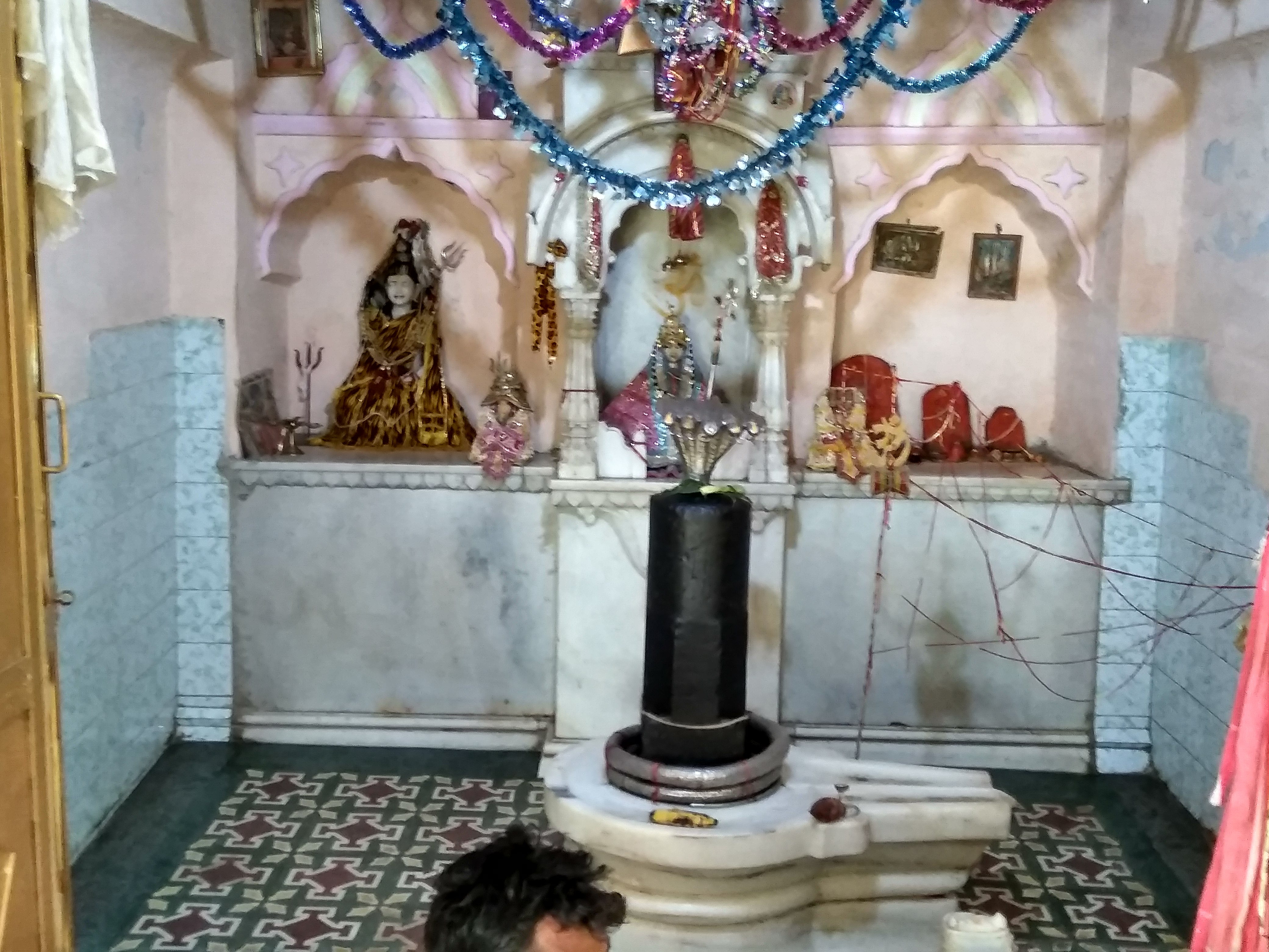 भगवान शिव का अतिप्राचीन मंदिर जहां पर भगवान ने स्वयं प्रकट होकर केर के वृक्ष की तरफ अपना चिमटा फेंका था जिससे पृथ्वी और वृक्ष अट्टहास कर फट गये